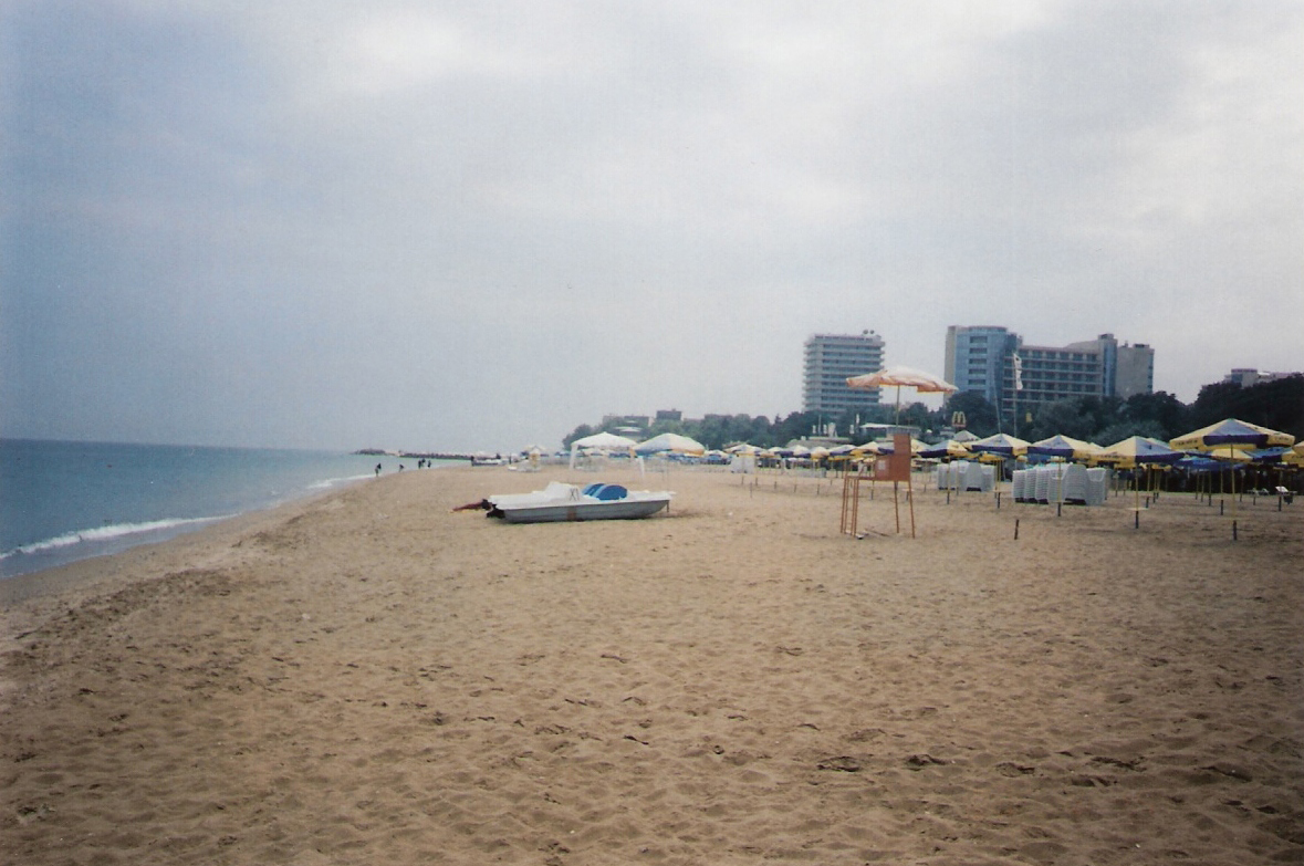 golden sands beach-varna